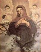 Virgen de Ainhoa Notre Dame D`Auspine